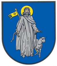 Historyczny herb Pomorzan